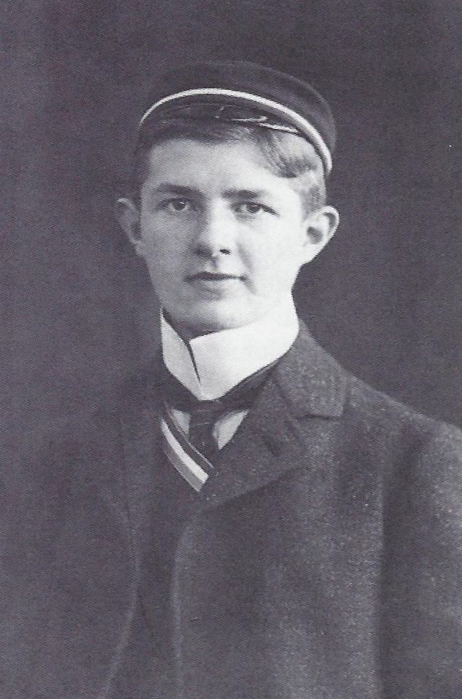 Porträtfotografie von Arnold Eucken